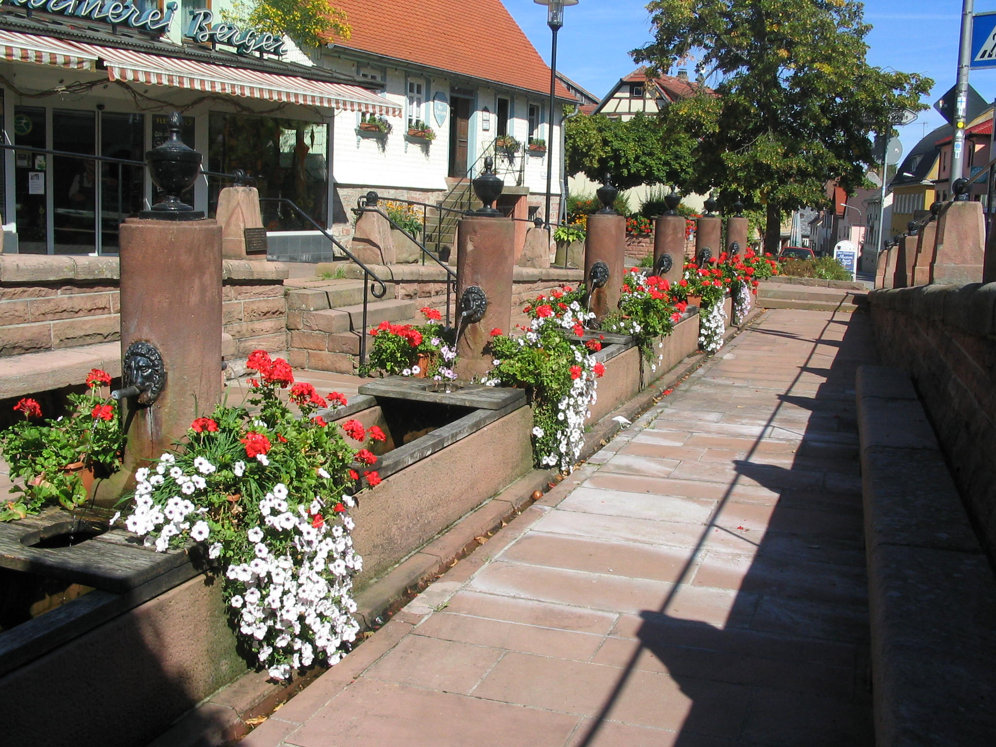 Mümling-Quelle (Zwölfröhrenbrunnen)in Beerfelden (Odenwald)